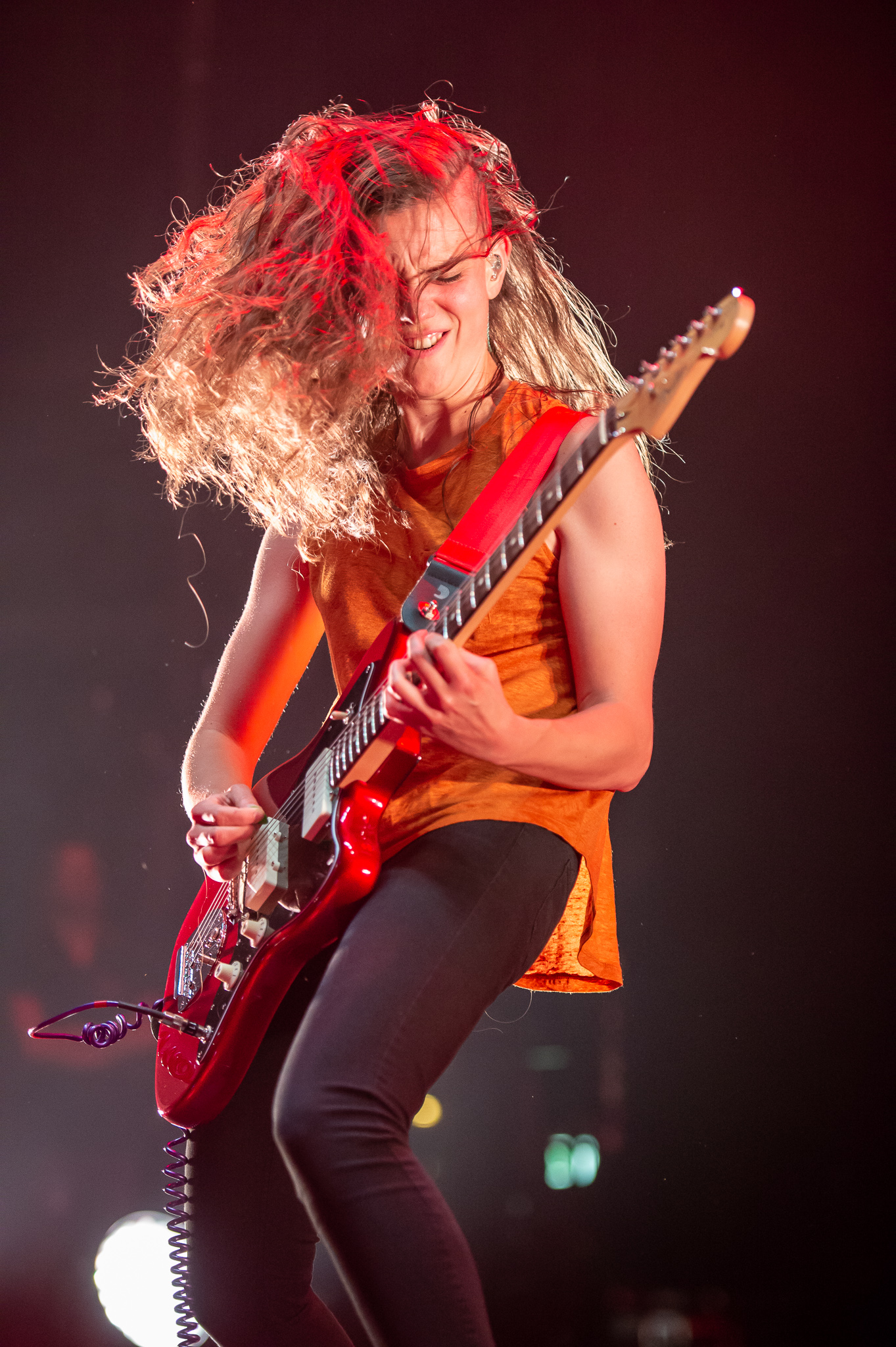 ARGO-Konzerte,Alternarena,Baroness,Festival,Gina Gleason,Konzert,Livekonzert,Livemusik,Musik,RiP,Rock im Park 2018